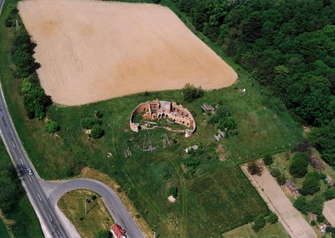 Kám, Hungary, aerialphotgraphy